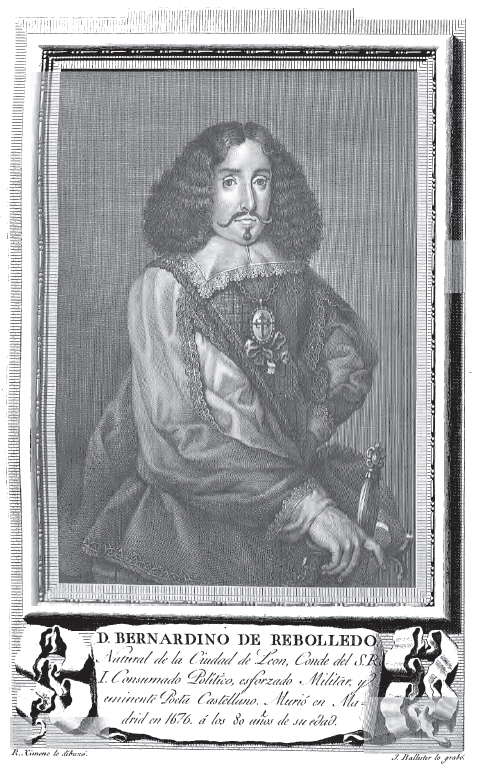 Retrato de Bernardino de Rebolledo.